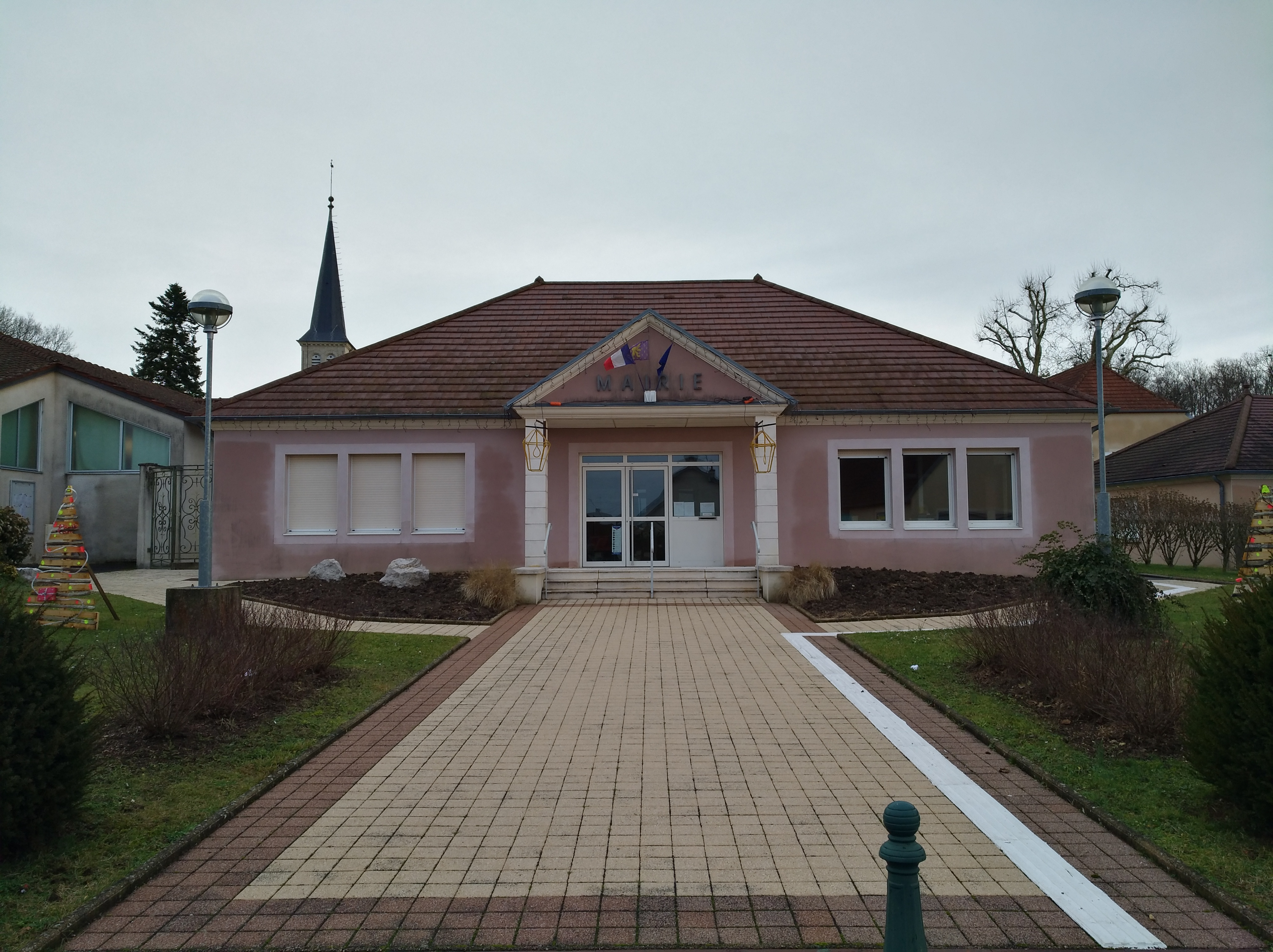 Villette-lès-Dole (Jura, France) en janvier 2018.